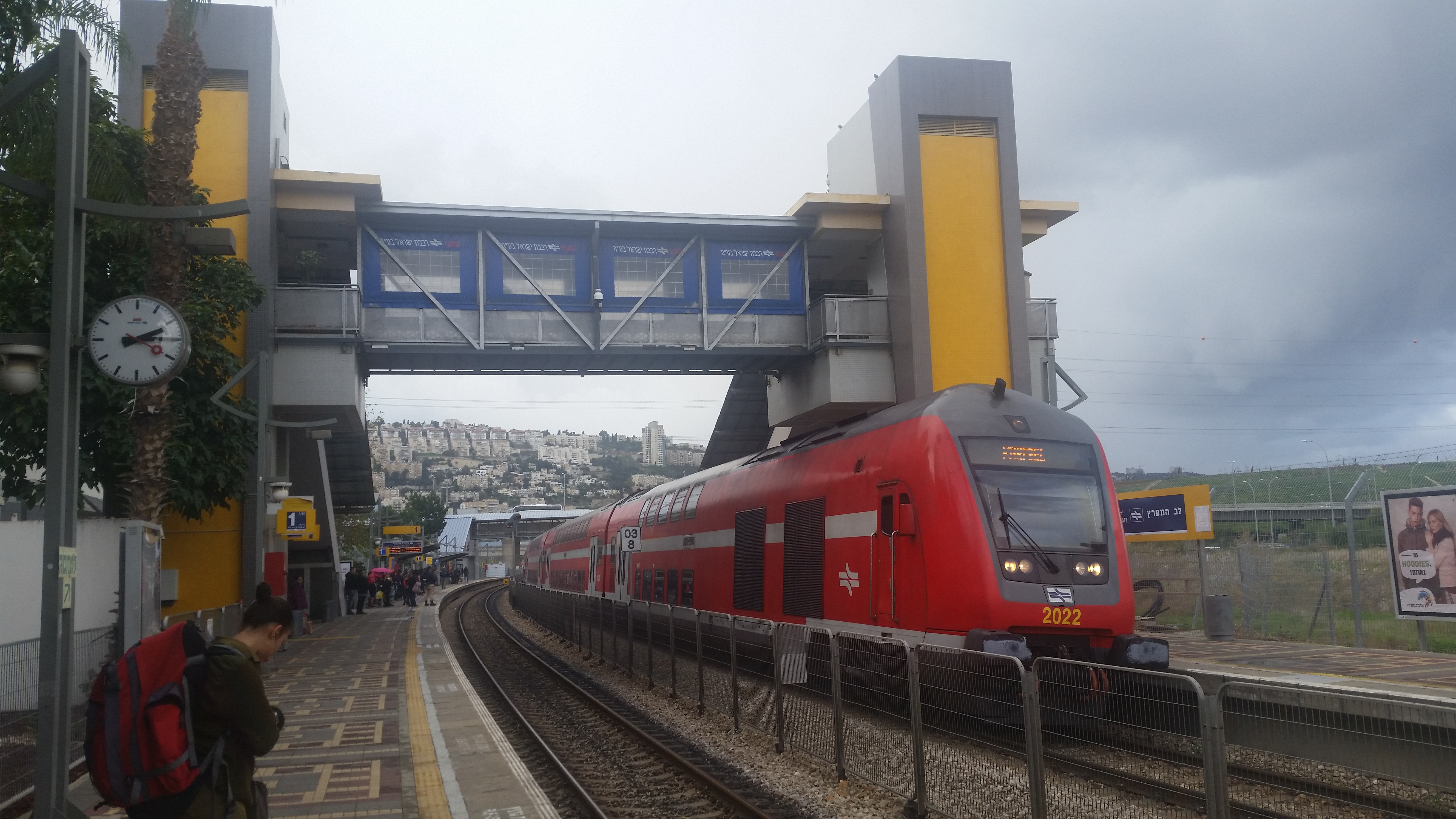 הרכבת לכרמיאל אוספת נוסעים בתחנת הרכבת לב המפרץ בצ'קפוסט